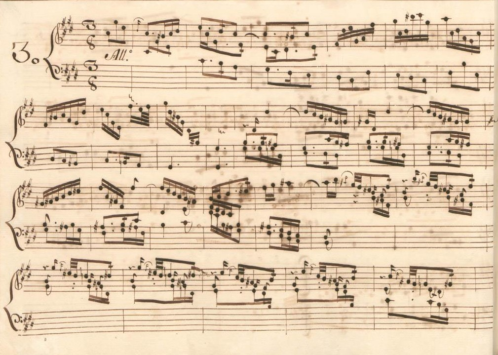 La sonate K. 247, telle qu'elle se présente dans le manuscrit de Parme, volume V no. 30.